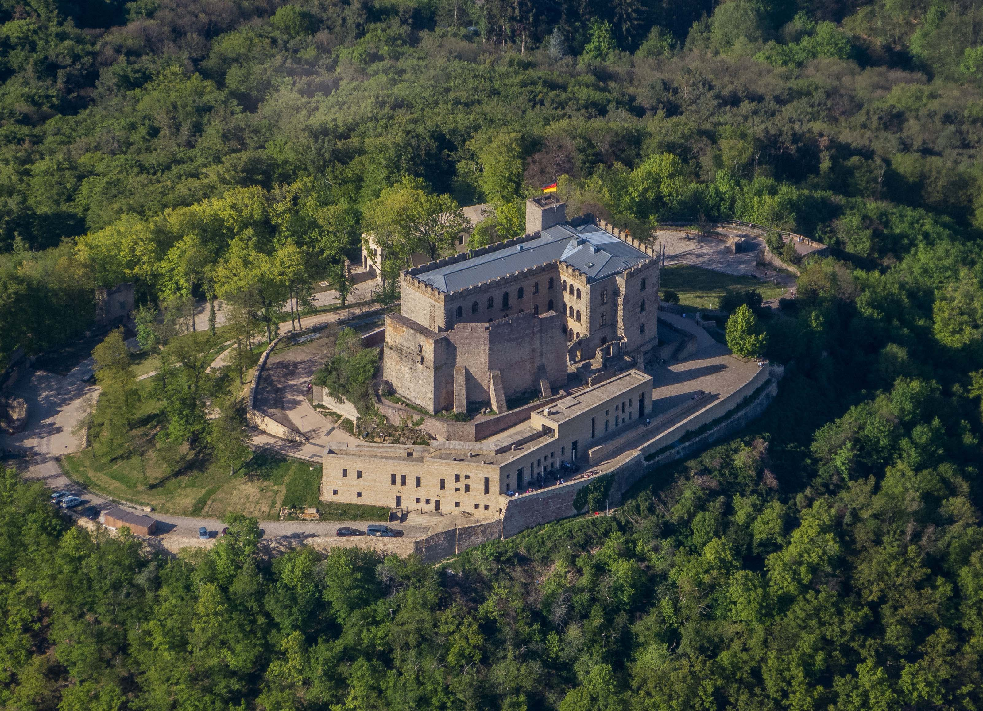 Hambacher Schloss, Luftaufnahme von Süden